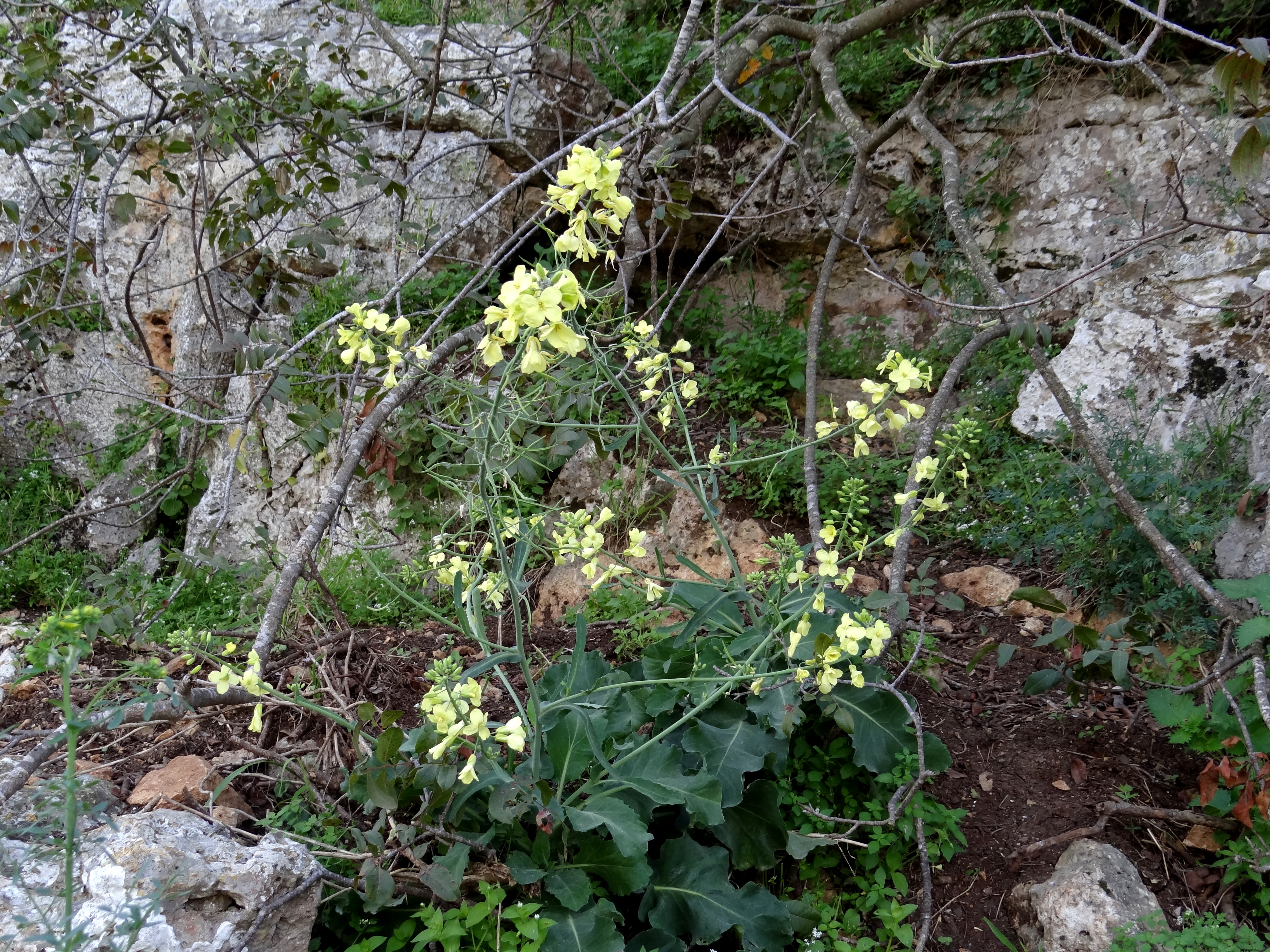 כרוב כרתי הוא בן-שיח בסוג כרוב במשפחת המצליבים. מין זה מצוי בסכנת הכחדה ובארץ ישראל הוא פורח רק בהר הכרמל. צולם בתחתית המצוק בקרבת מערת הגדי